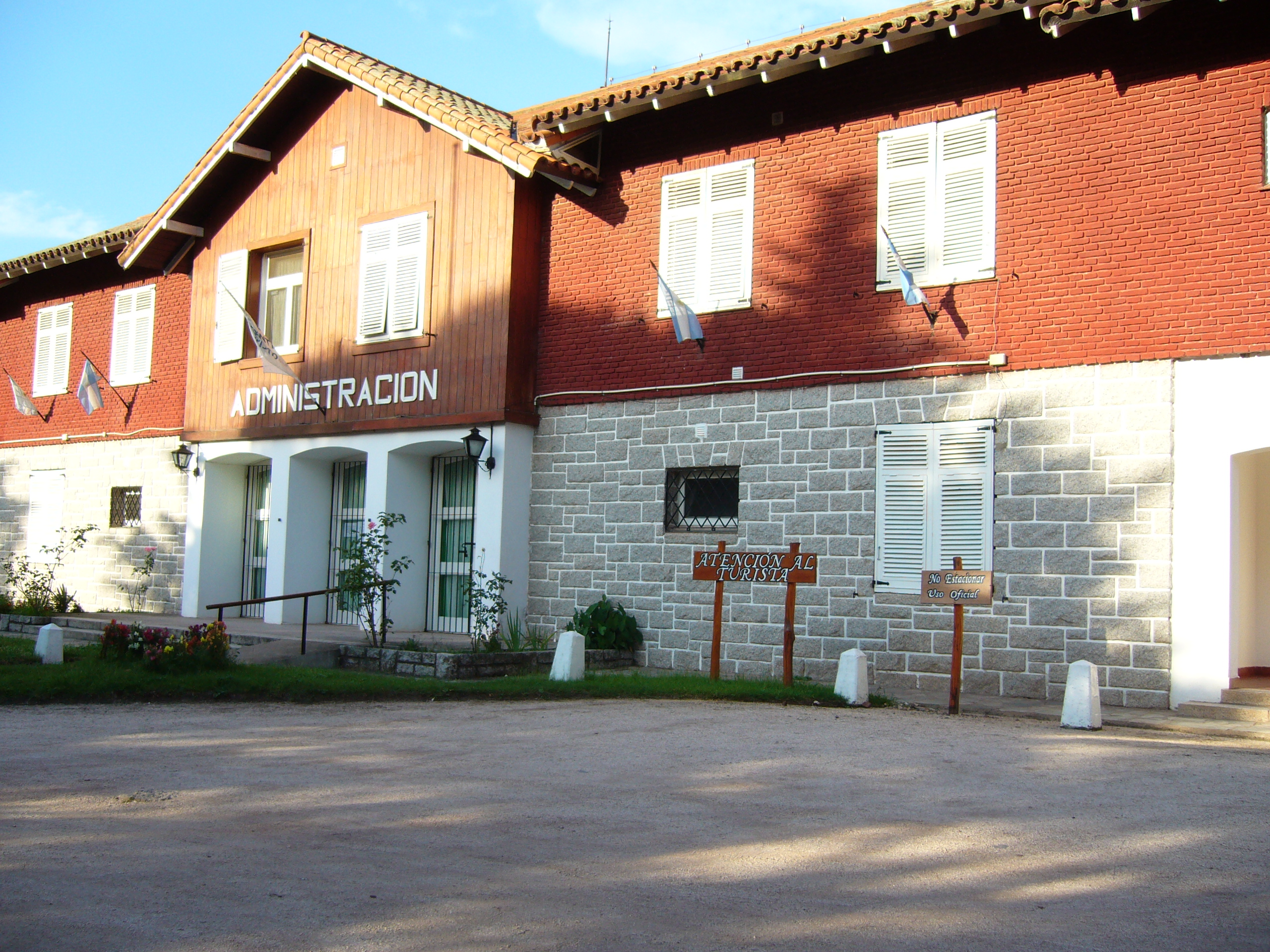 Vista parcial de la administración en 2009 Unidad Turística Embalse Córdoba Argentina